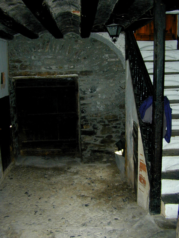 Acceso interior desde el patio de la vivienda a la primera planta de la torre fortificada